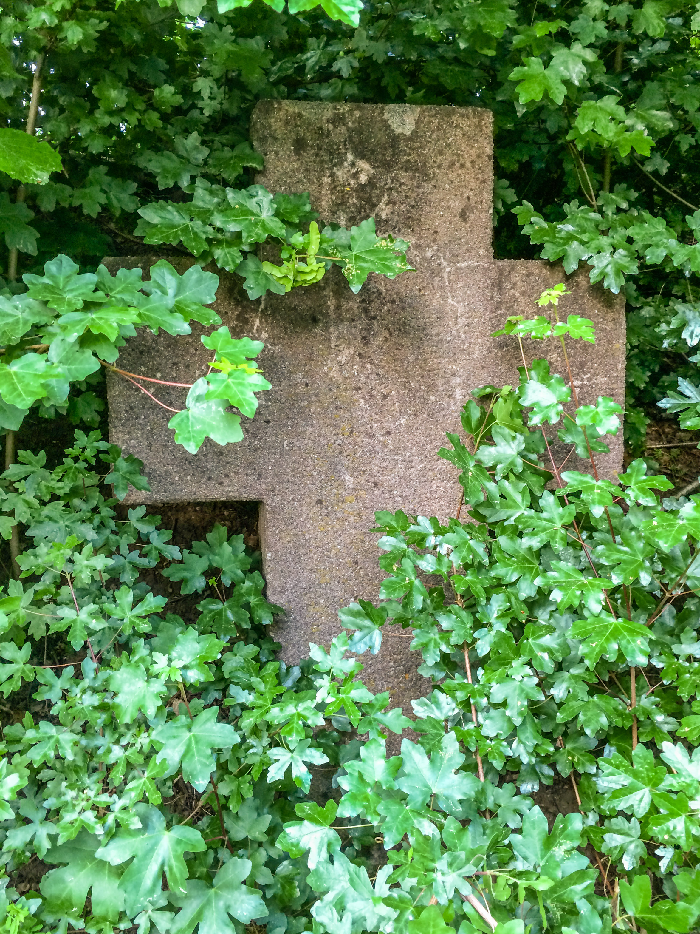 Kemmeterkreuz Großschwarzenlohe, neuzeitliches Replik